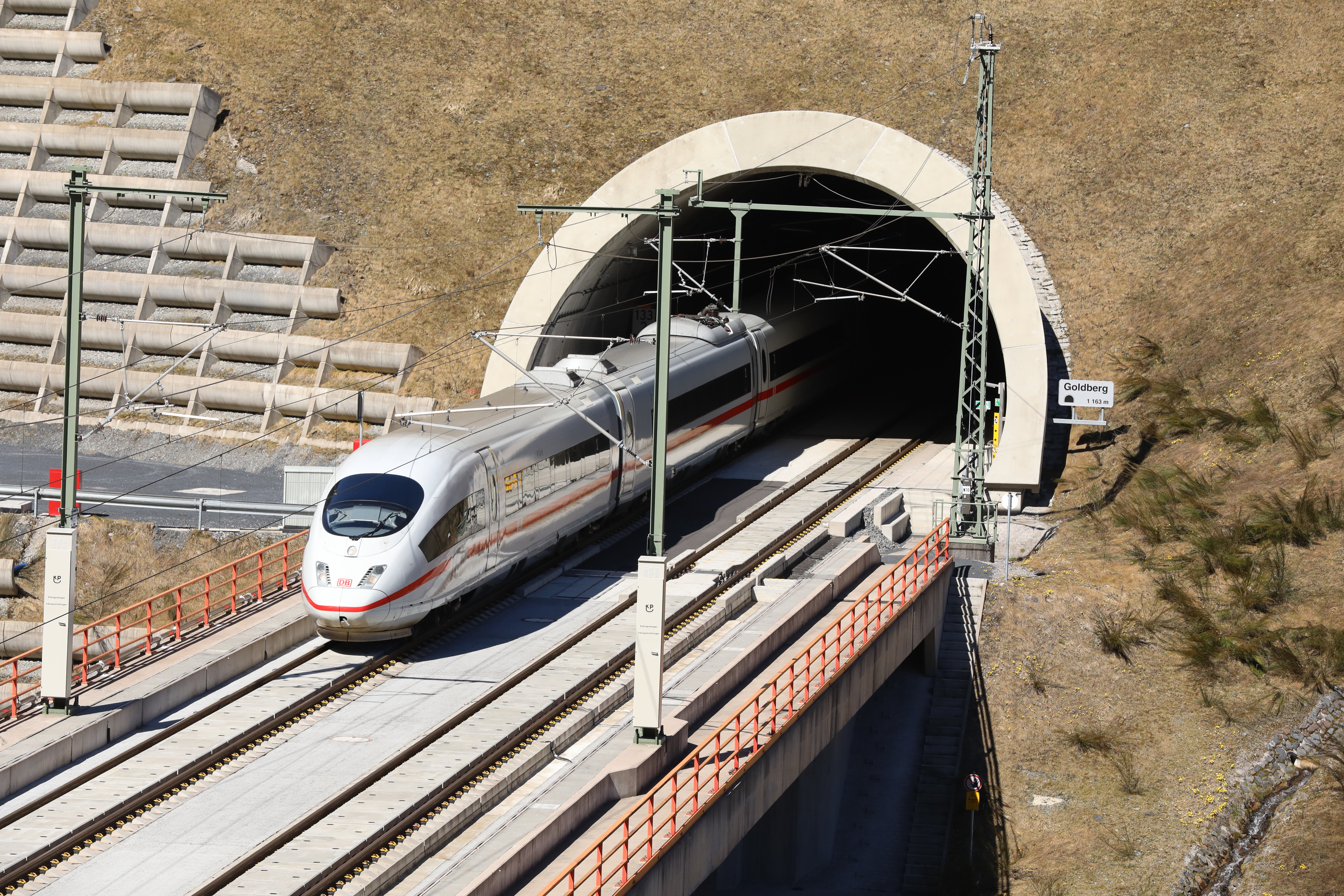 Tunnel Goldberg, Südportal